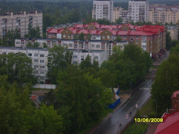 Панормама города Всеволожска, Ленинградская область.